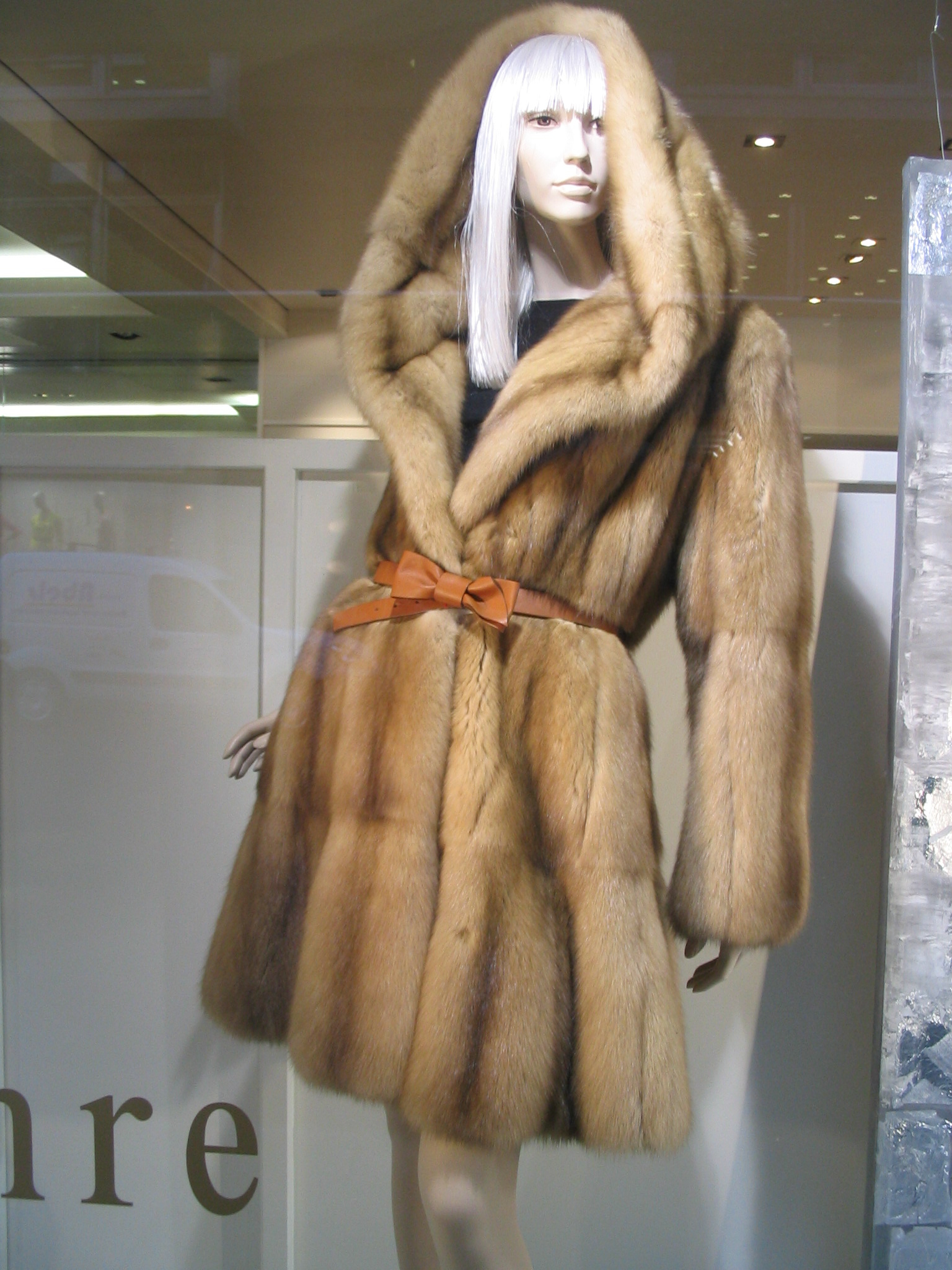 Kurzmantel aus russischem Goldzobel. Firma Slupinski, Königsallee, Düsseldorf, 2011.